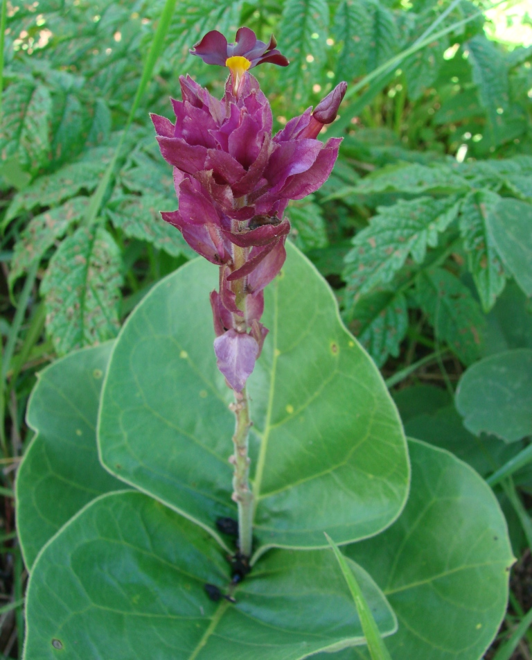 Prestonia erecta (Malme) J.F. Morales - Sin. hom.Rhodocalyx rotundifolius Müll. Arg. - APOCYNACEAE - Parque Nacional da Chapada dos Veadeiros - Alto Paraíso de Goiás - Goiás - Brasil.